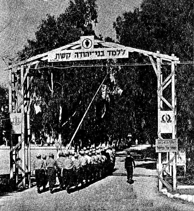 שער בה"ד 4